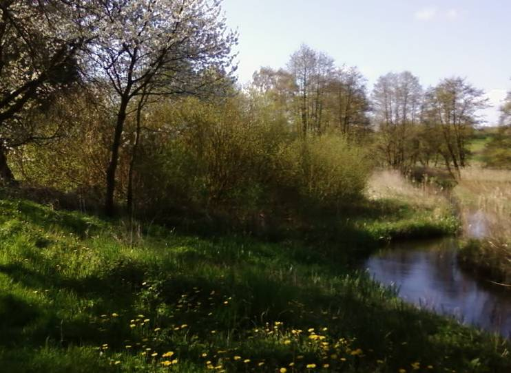 Radegast bei Holdorf.